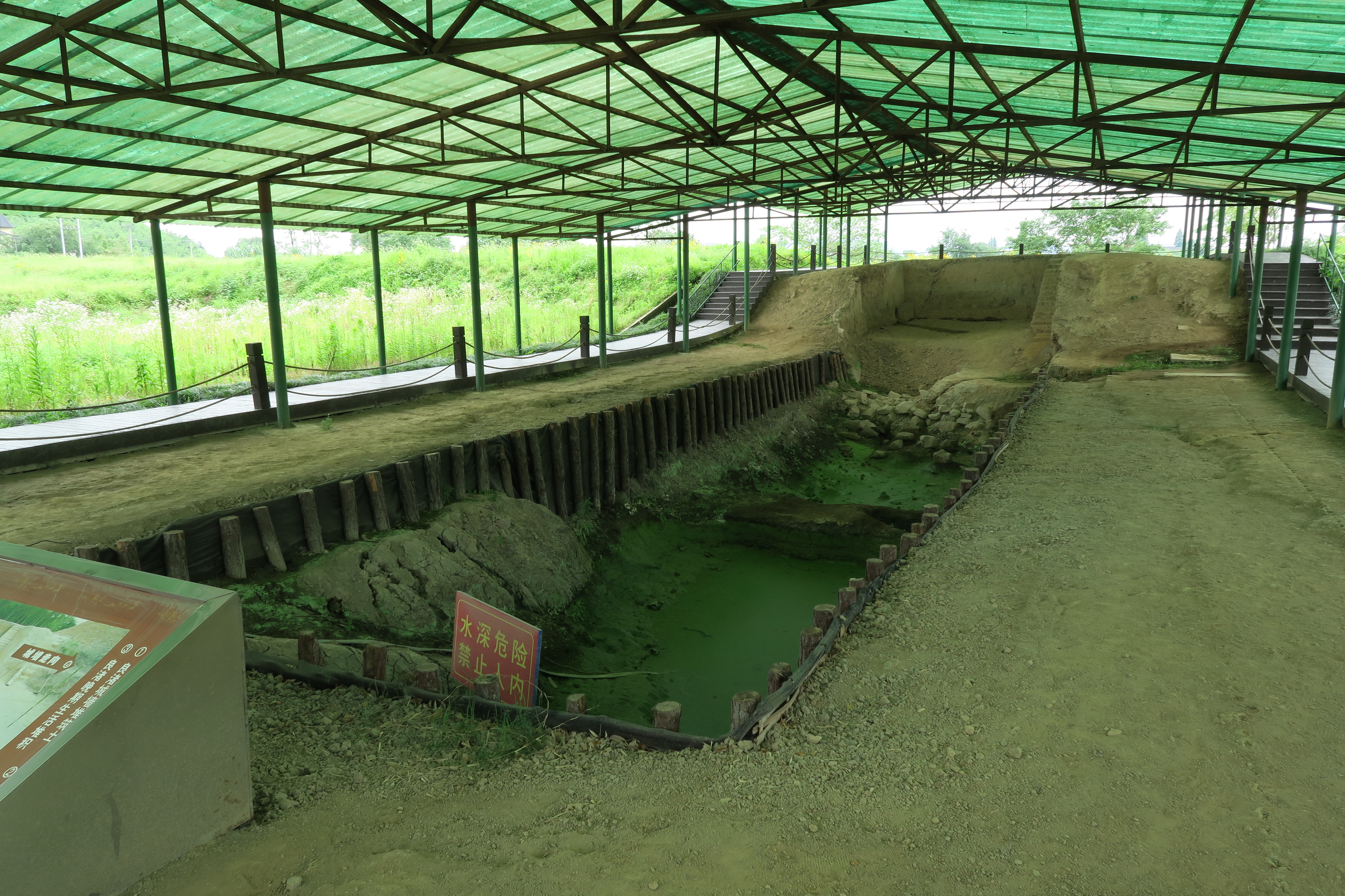 良渚古城北城墙展示区